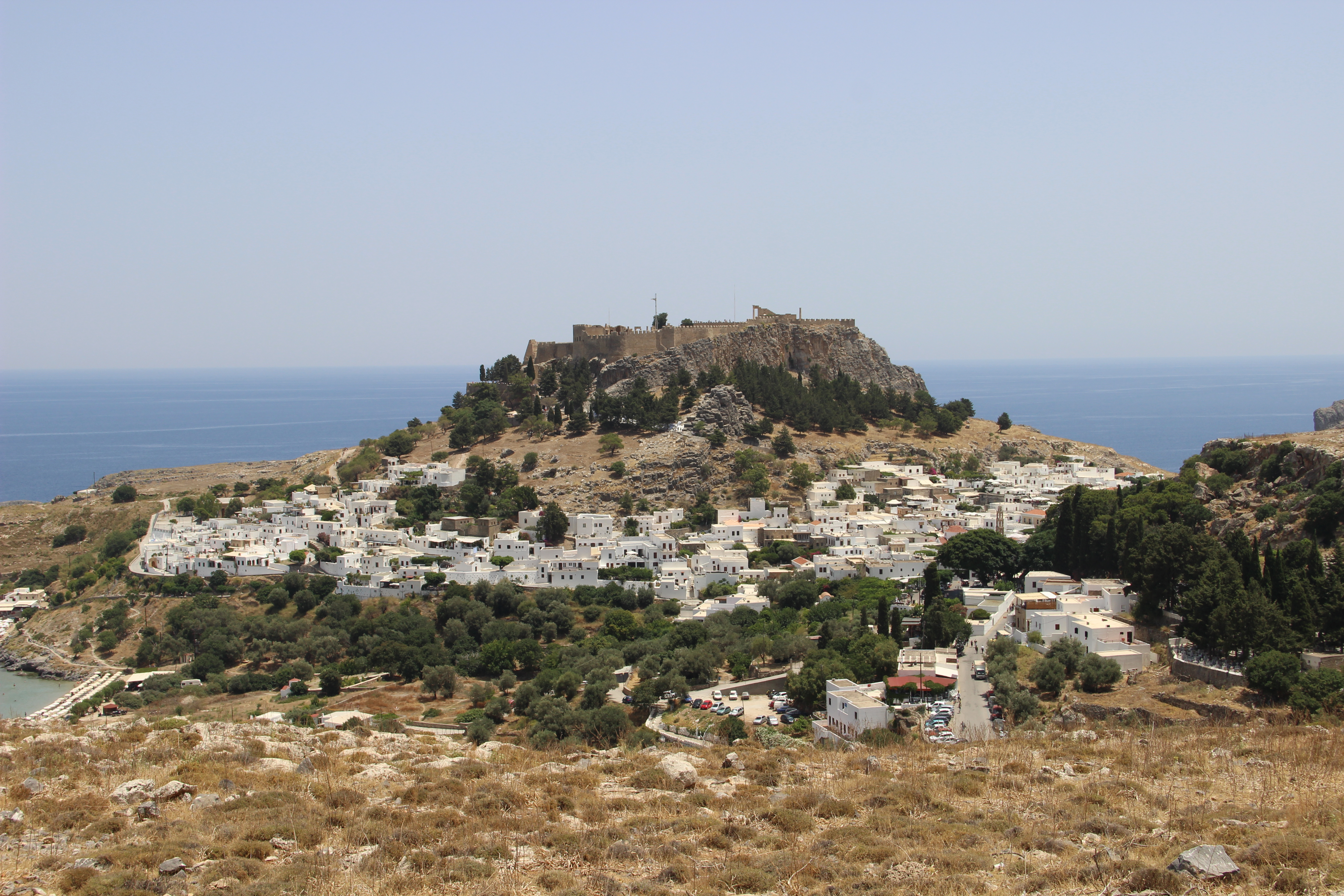 Вид на Lindos с дороги. Rodos. Greece. Июнь 2014